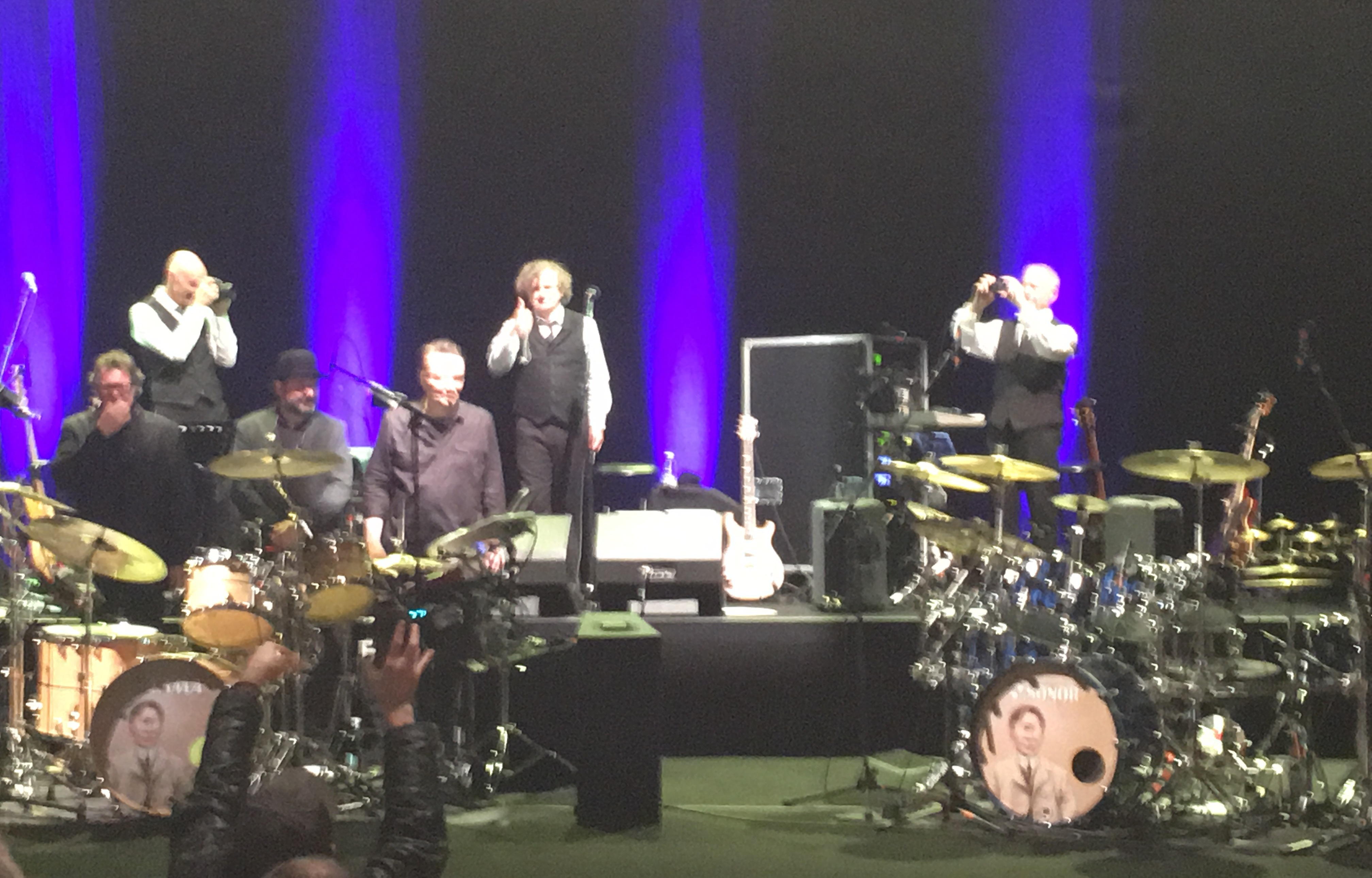 Concierto realizado en el Palacio Municipal de Deportes de Madrid. European Tour 2016 con Robert Fripp, Gavin Harrison, Mel Collins, Jakko Jakszyk, Pat Mastelotto, Tony Levin y Jeremy Stacey